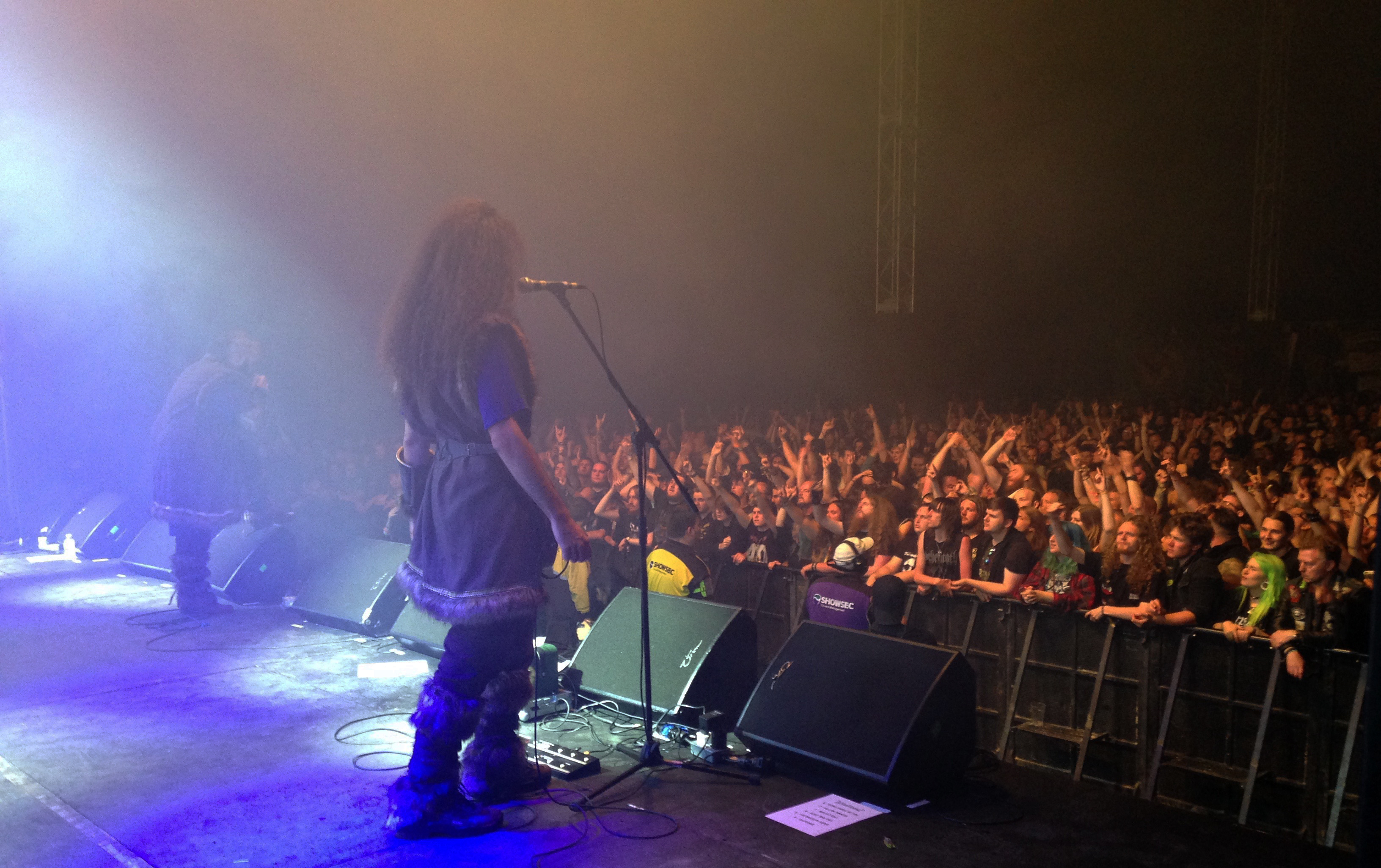 イギリス、ブラッドストックフェスティバル 2017年8月